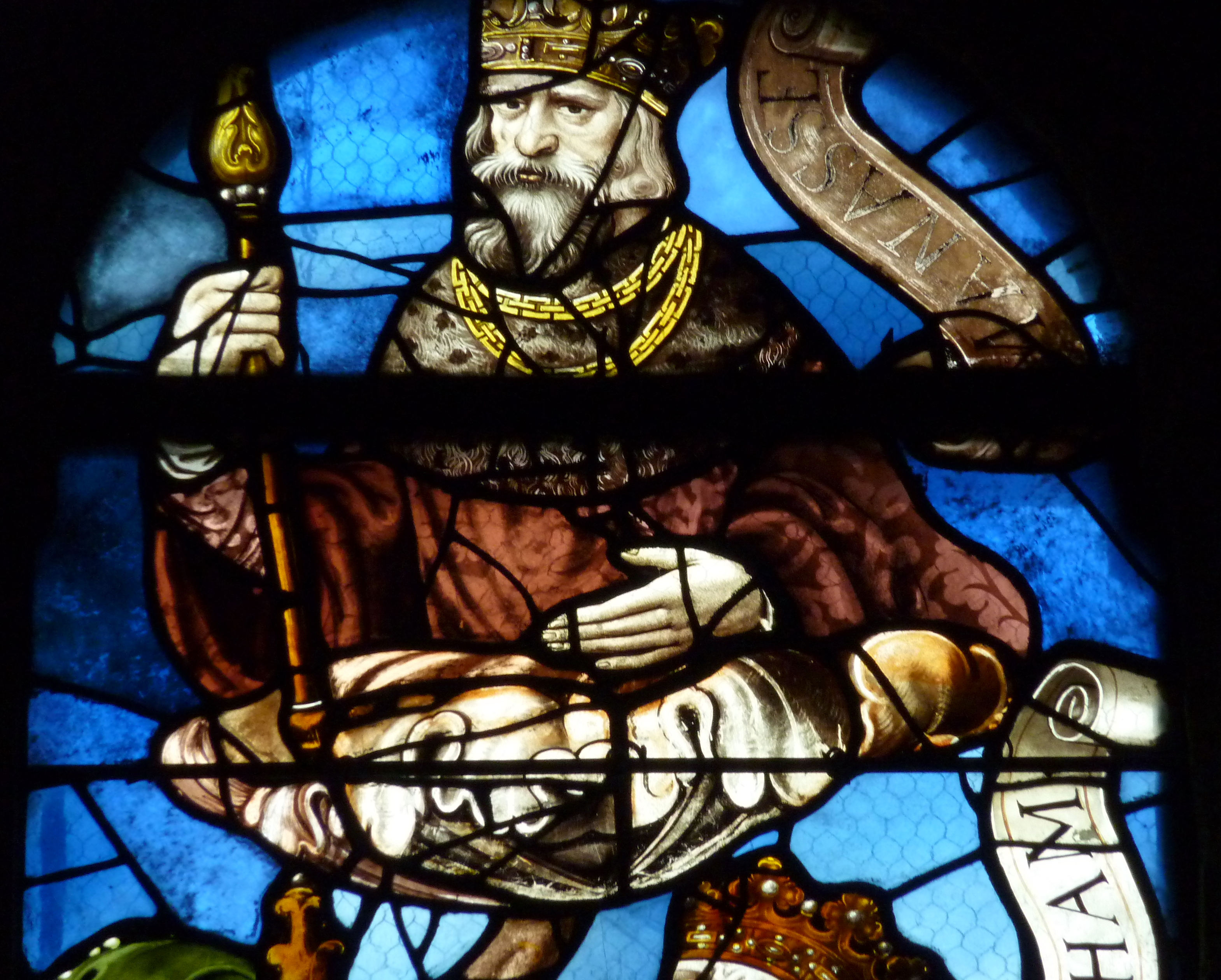 Bleiglasfenster in der katholischen Pfarrkirche Saint-Martin in Groslay, Darstellung: Wurzel Jesse mit Ausschnitt: Manasse